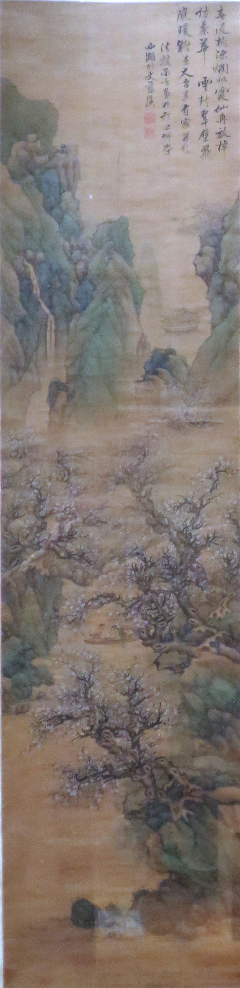 Hanging scroll